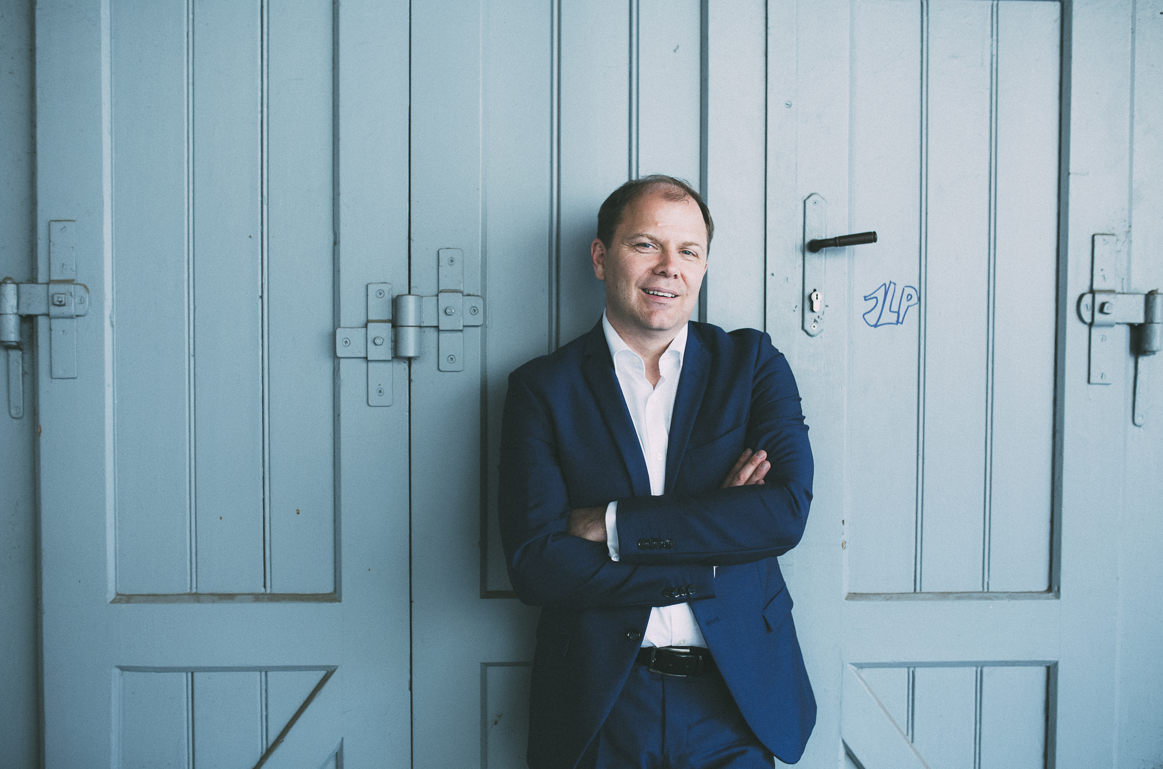 Bernhard Rinner (c) Marija Kanizaj